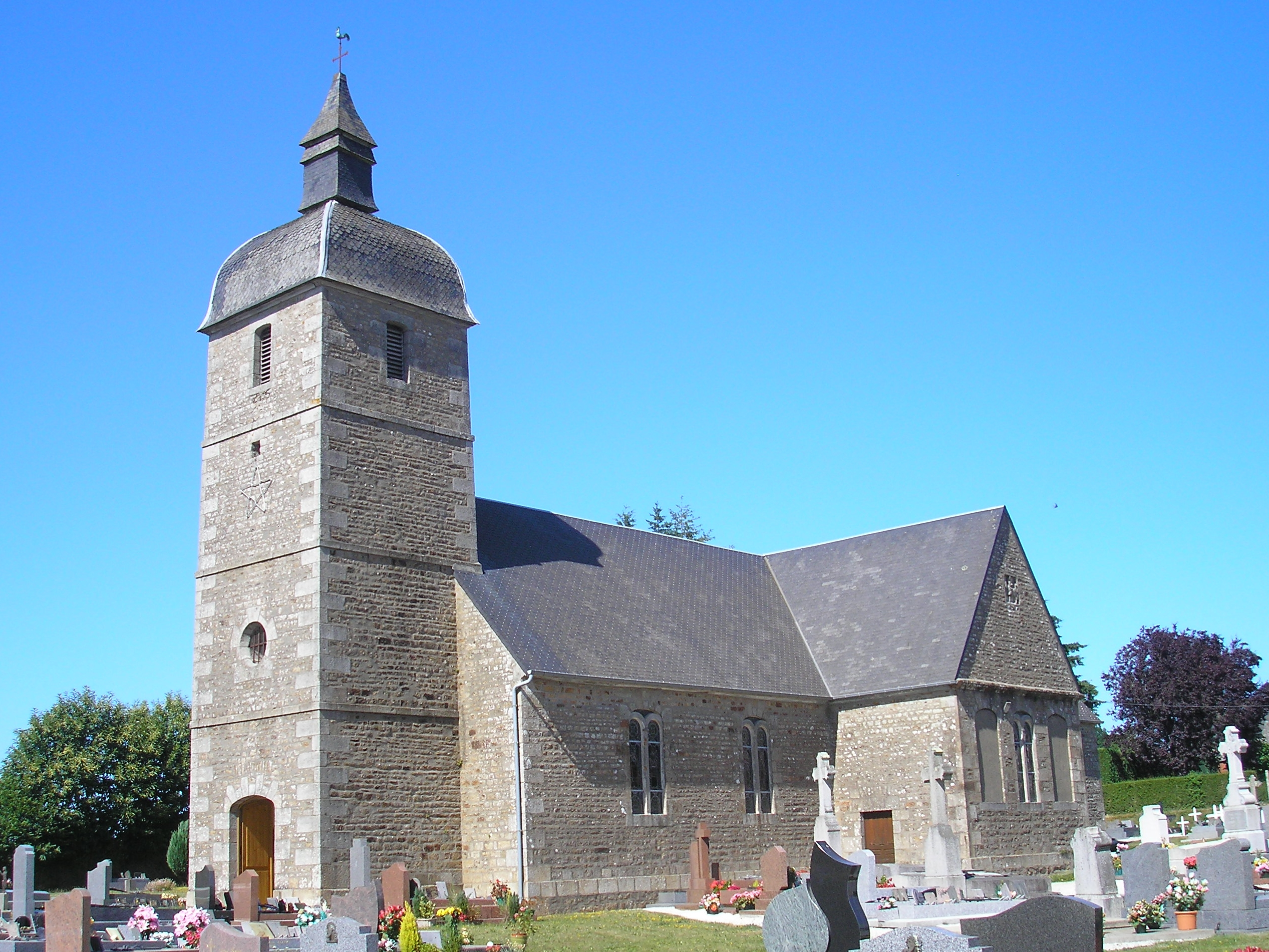 Saint-Martin-le-Bouillant (Normandie, France). L'église Saint-Martin.